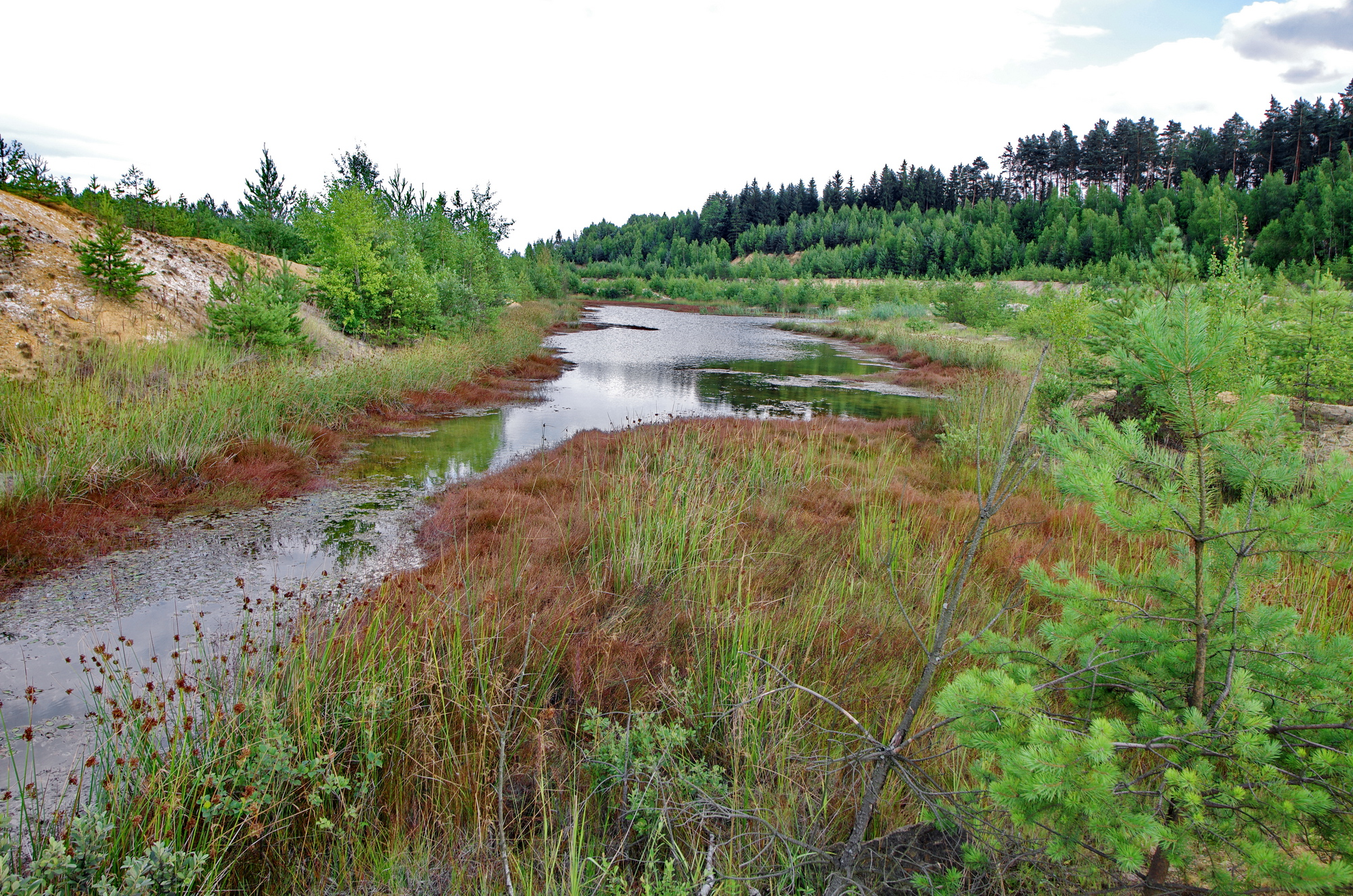 Evropsky významná lokalita Pískovna Erika, okres Sokolov